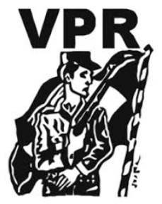 Imagen usada comunmente en comunicados hechos por la guerrilla Vanguarda Popular Revolucionária